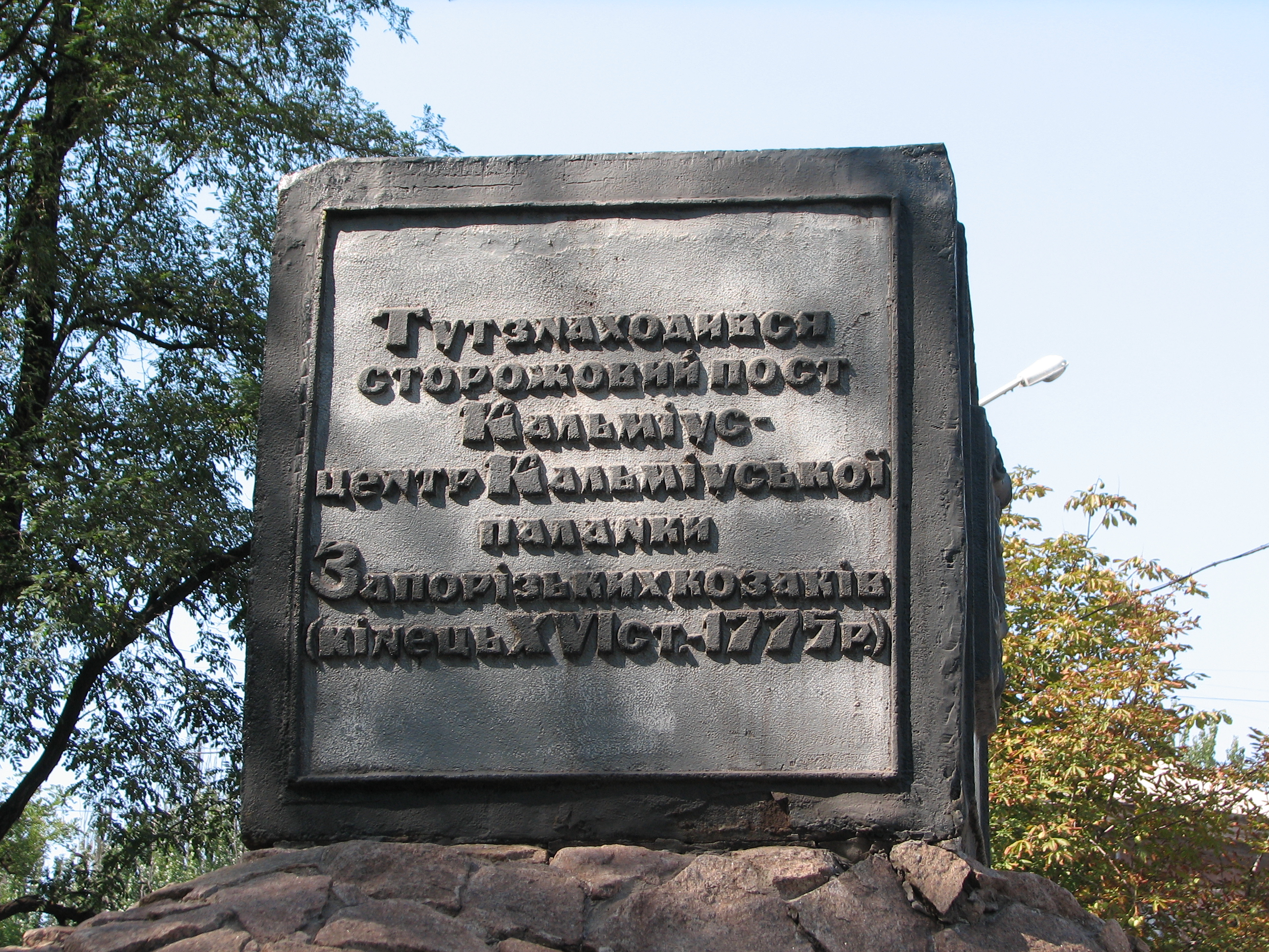 Жовтневий р-н, Площа Визволення